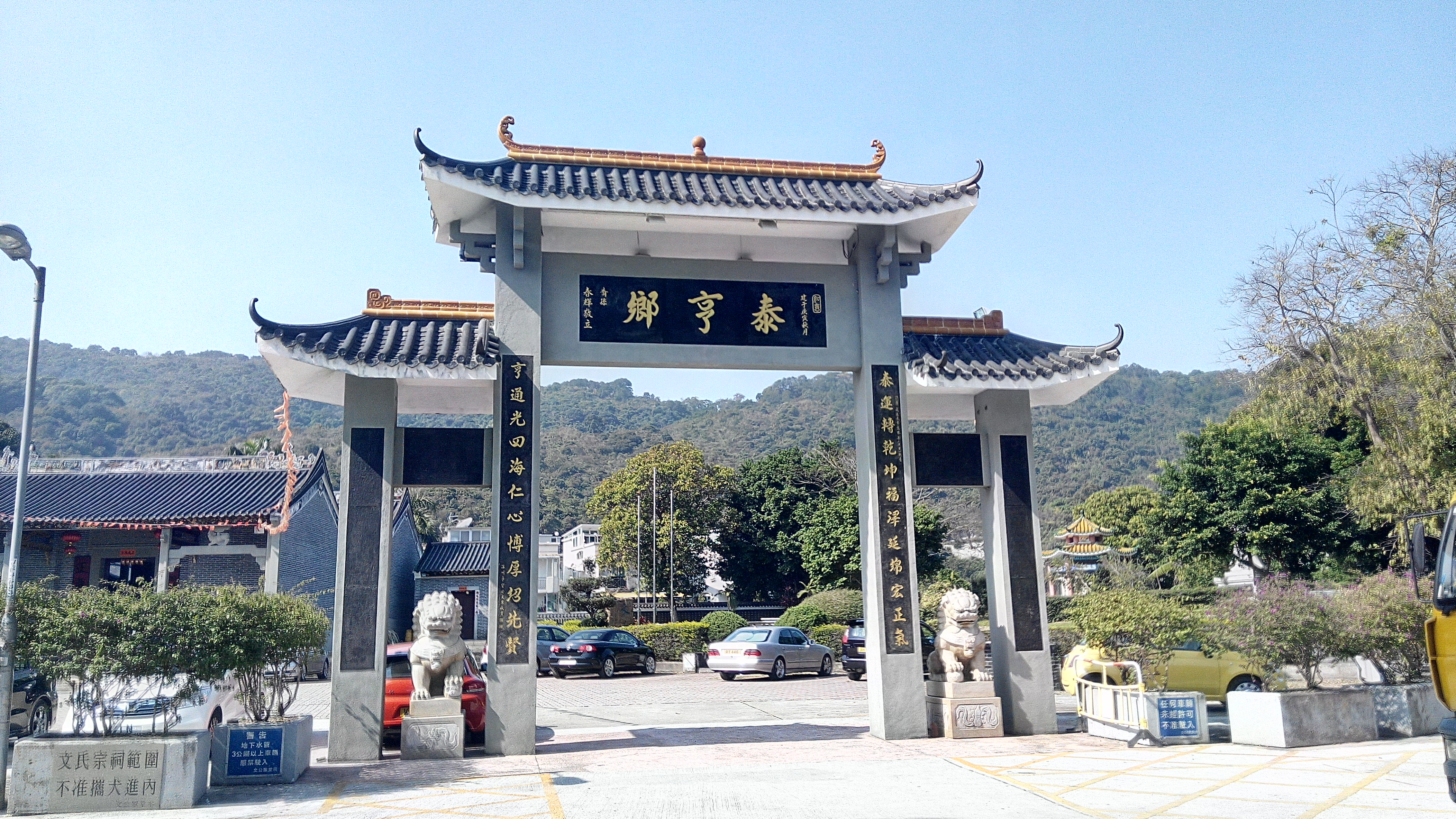 泰亨鄉牌樓